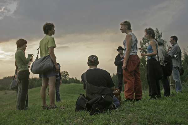 warsztaty poprzedzające spektakl Missa Pagana, Teatr Akcje 2007 (a workshop before Missa Pagana, Teatr Akcje.